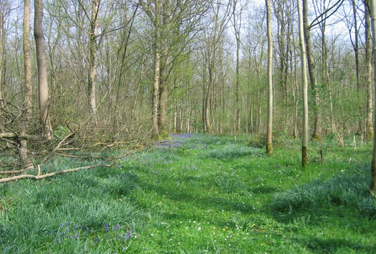 En région Nord-Pas de Calais, les seules stations connues de Gagée à spathe sont situées dans le bois des Lanières (commune de La Longueville)